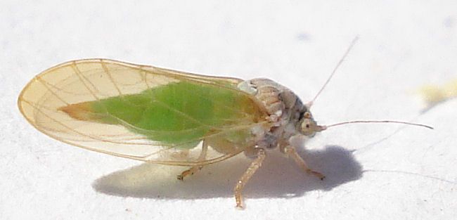 Puszpáng-levélbolha (Psylla buxi) On: Box Location: Lincoln City Site: Boultham Park